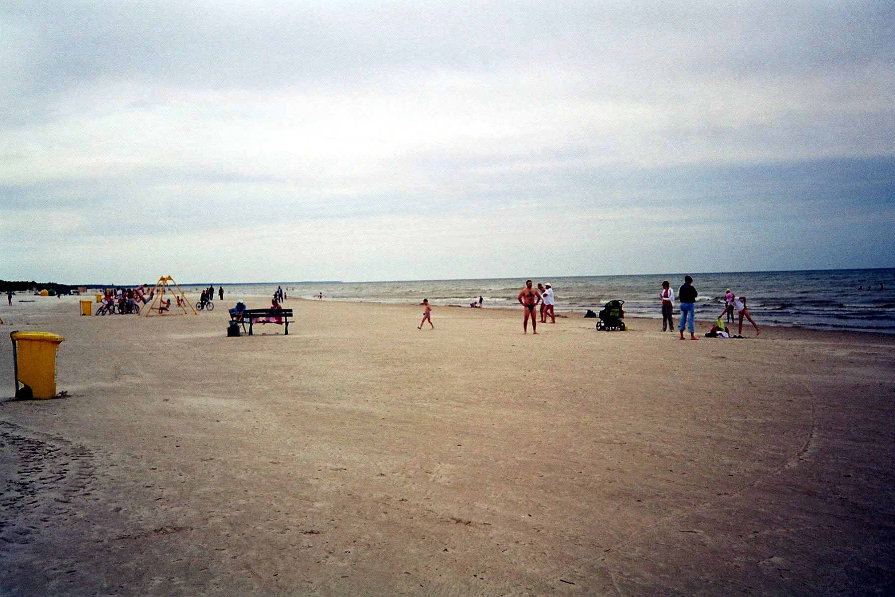 Strand Liepaja